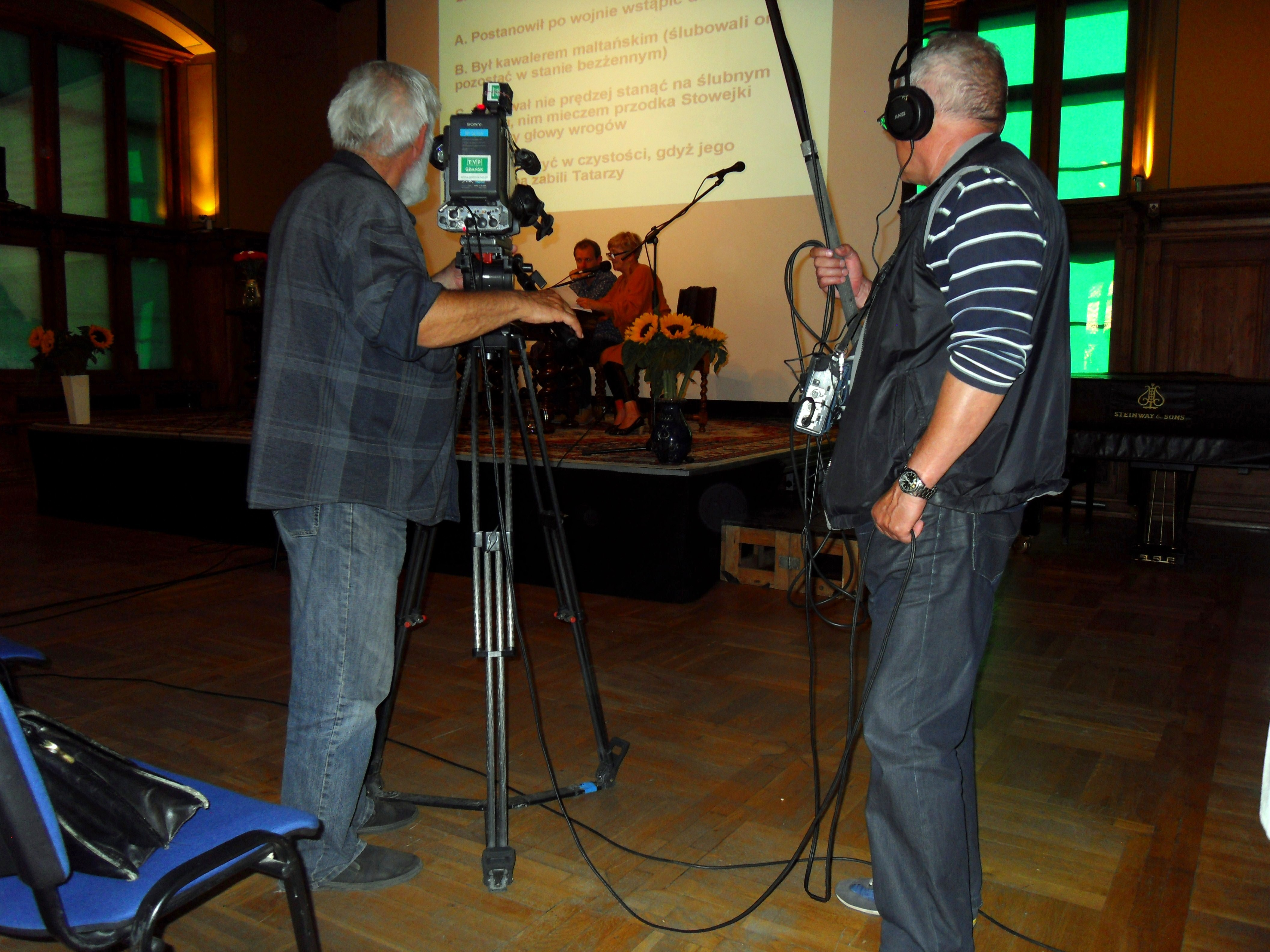 "Panorama Gdańsk" (TVP Gdańsk), ekipa w trakcie nagrywania materiału do Panoramy.